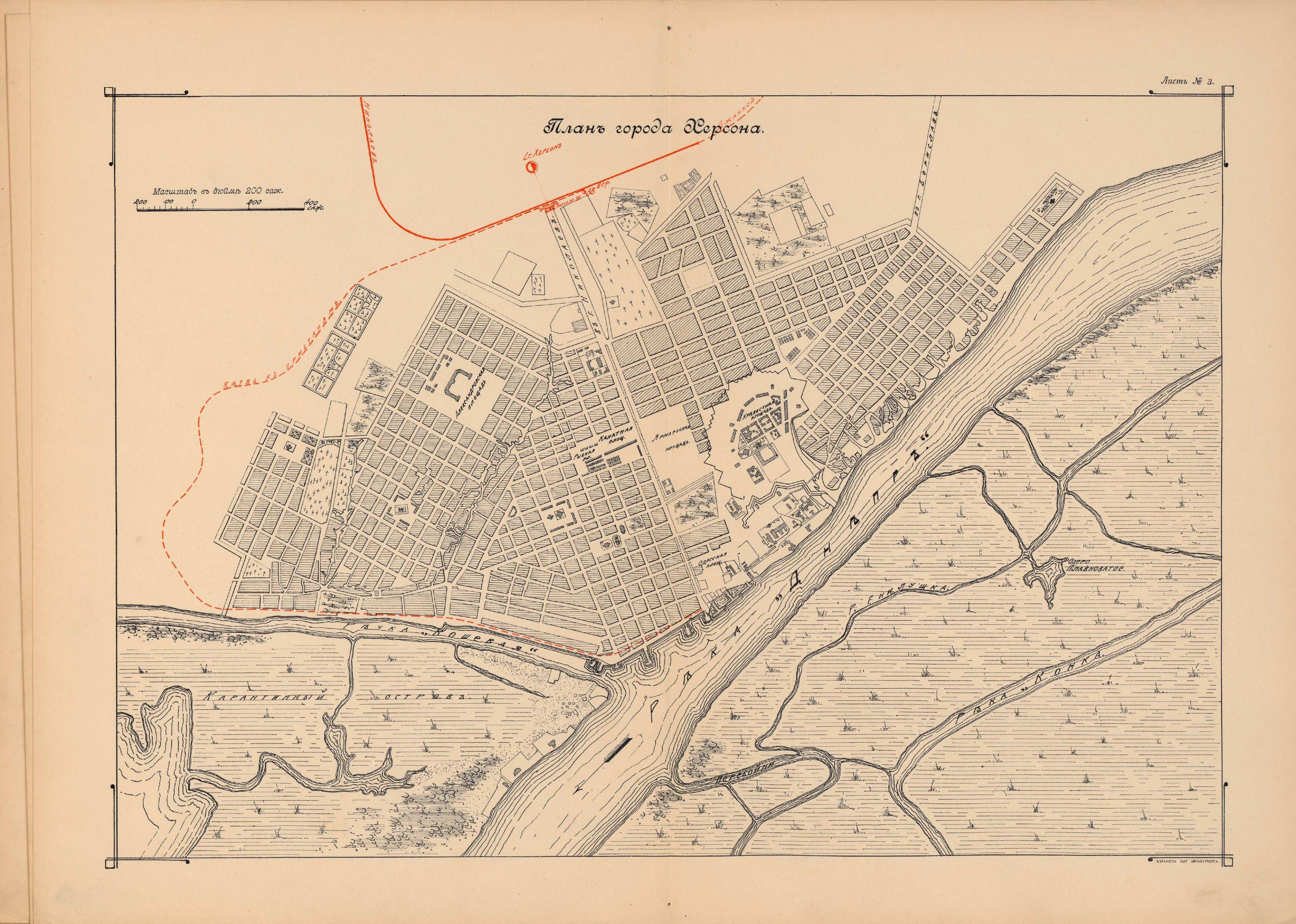 План Херсону 1908 р. Харківсько-Миколаївська зал. "Опис споруди ділянки Миколаїв—Херсон. 1905—1907" - Харків : Літогр. Зільберберг, 1908